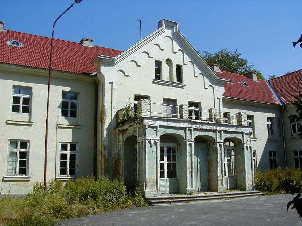 Zūru muižas pils 2002-07-10